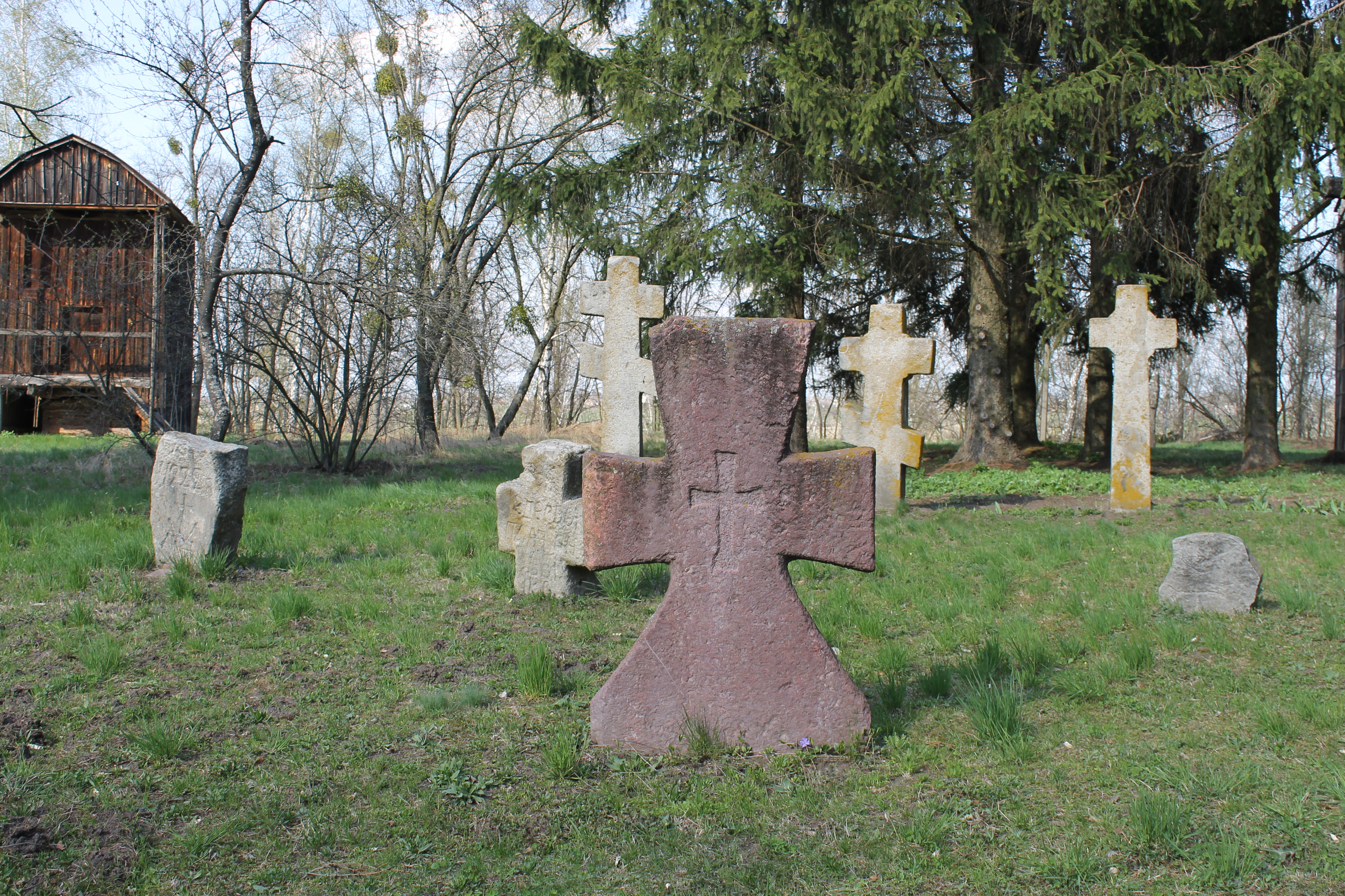 Фото 3. Колекція надгробних хрестів біля Покровської церкви., Покровська церква з села Сухий Яр